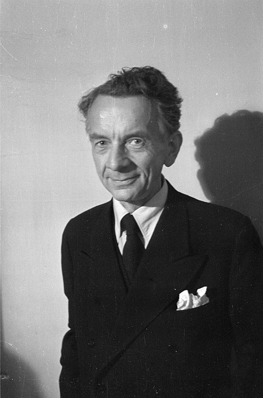 Original image description from the Deutsche Fotothek Aufnahmen von M. Friedrichs, M. Fischer, Hermann Matern, Arno Schellenberg und Frau, Frau Gret Palucca, Erich Ponto, Prof. Joseph Keilberth, Otto Falvay